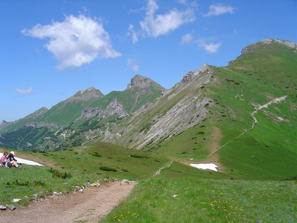 Hlupy, Zdiarska vidla and Havran from Predne Kopske sedlo (from the right)